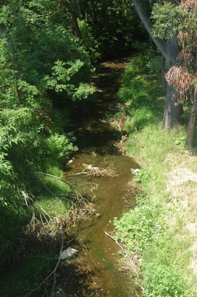 Chvojnica river, western Slovakia